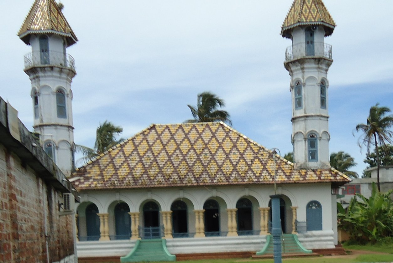 കണ്ണൂരിലെ_അറക്കൽ_പള്ളി